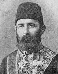 Hasan Fehmi Paşa (d. 1836- ö. 1910) Osmanlı Devleti'nde valilik, çeşitli nazırlıklar ve adalet kurumlarında görev yapmış Gürcü asıllı bir Osmanlı devlet adamı.